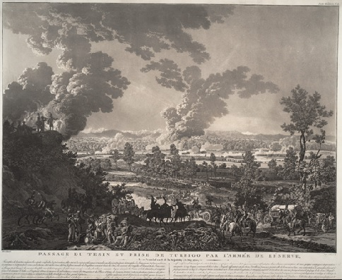 Passaggio del Ticino a Turbigo da parte dell' esercito francese